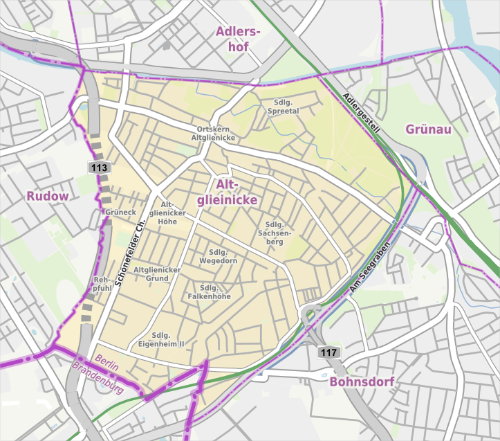 Übersichtskarte der Straßen und Ortslagen in Berlin-Altglienicke